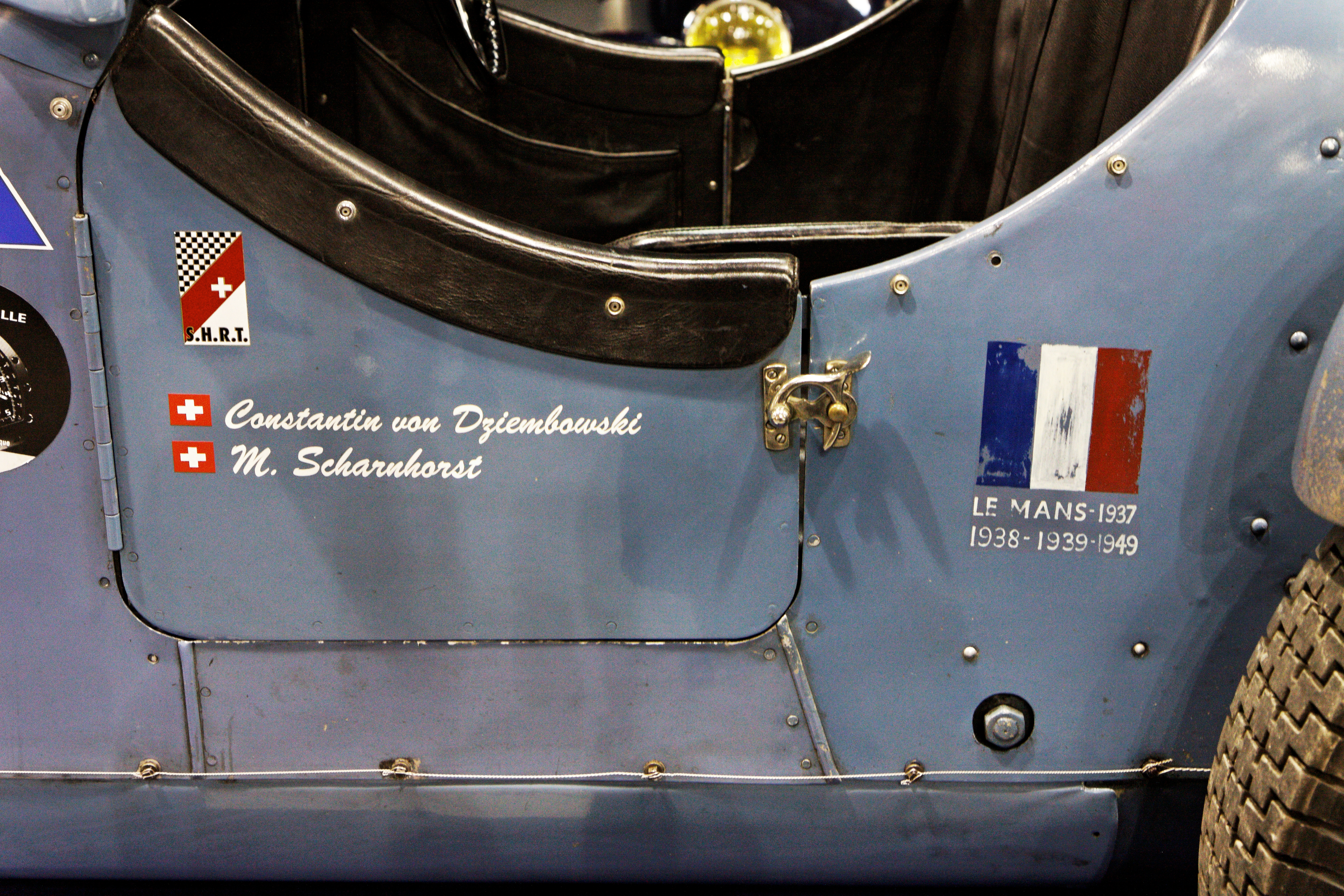 Une Talbot T150C présentée lors du salon Retromobile 2013.